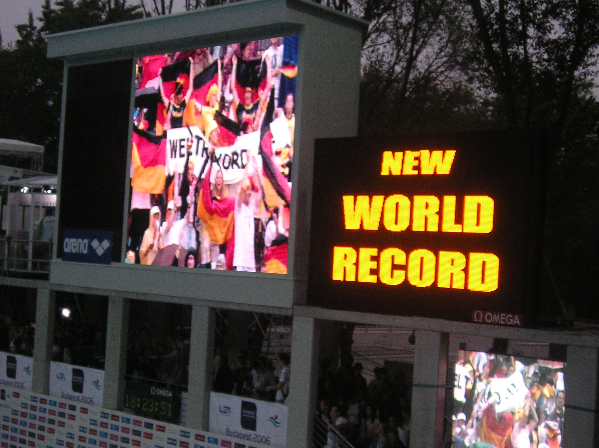 Wereldrecord 4 x 200 meter vrije slag vrouwen tijdens het EK Zwemmen 2006 in Boedapest.